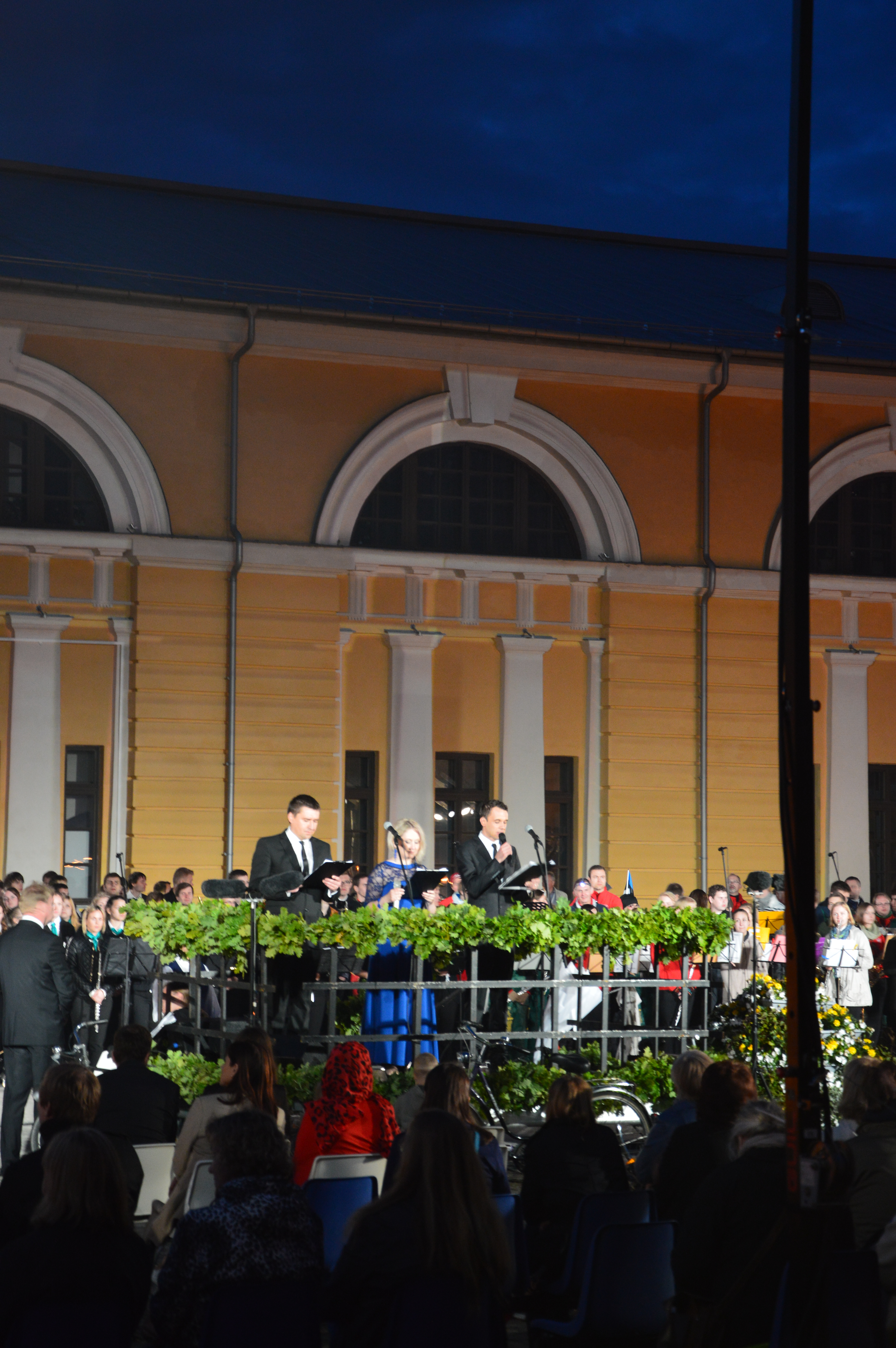 Gaudeamuse avamine Daugavpilsi kindluses.